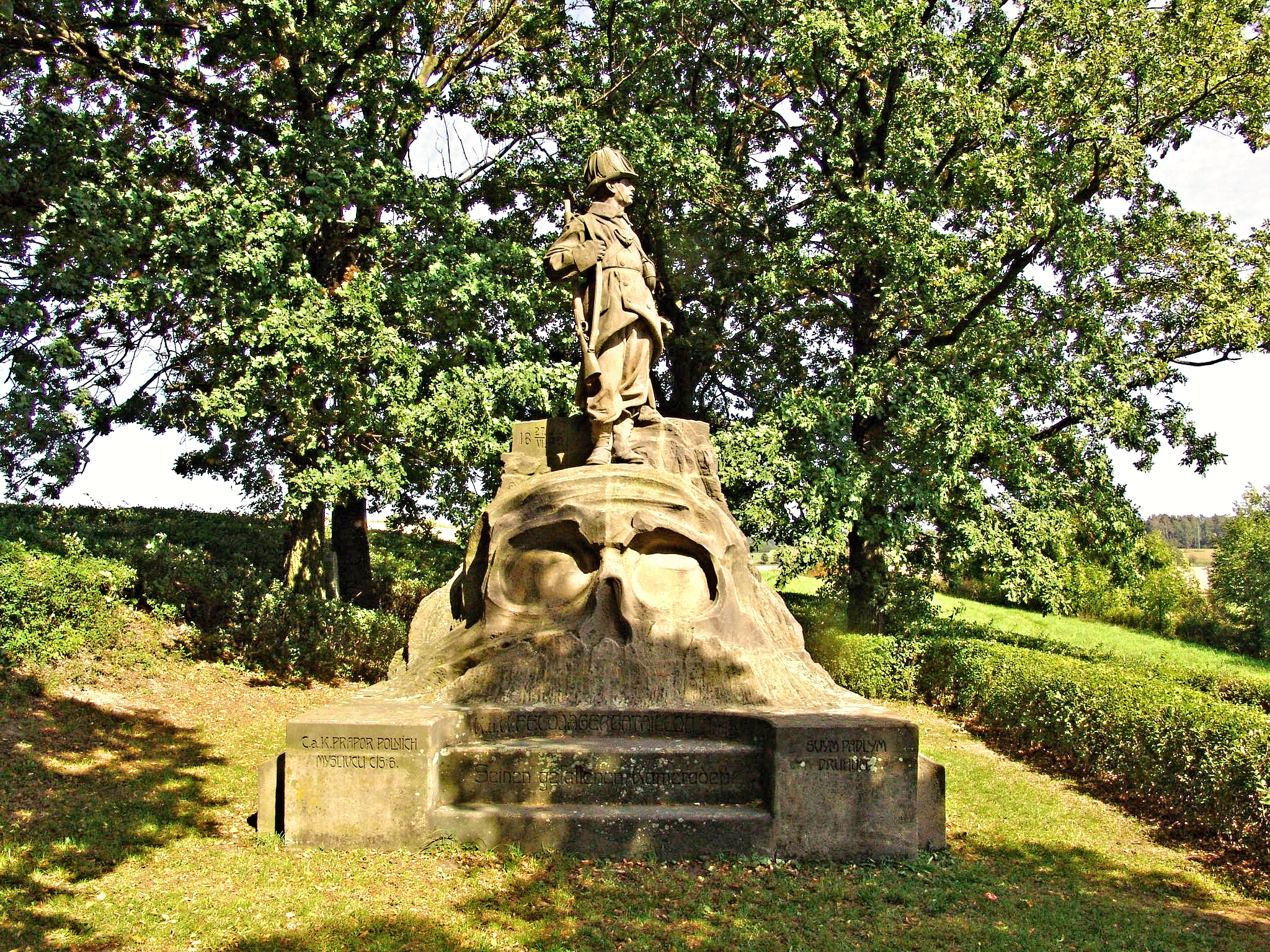 Vysokov, okres Náchod, návrší západně od obce: pomník z války 1866 - myslivec.